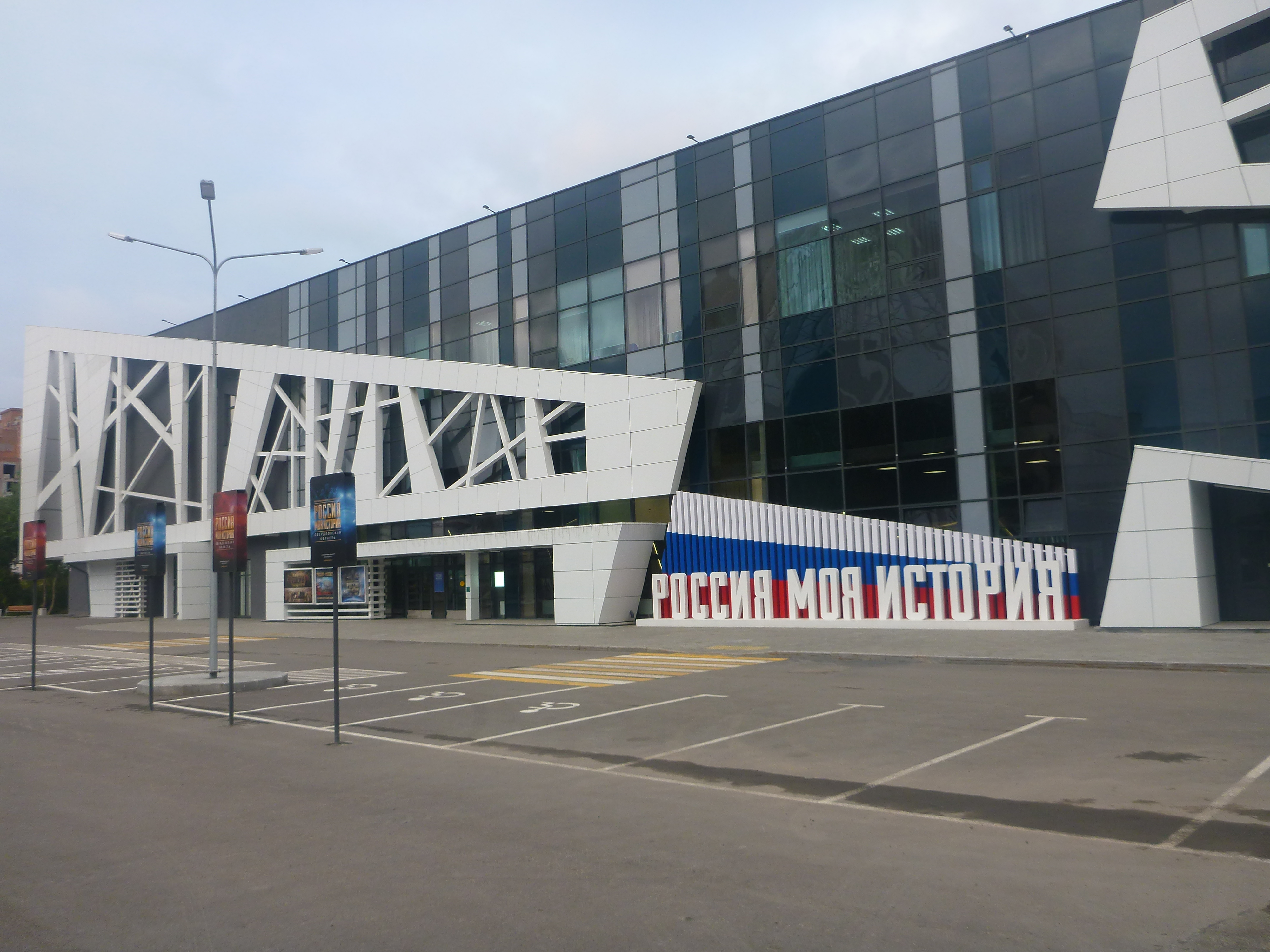 Парк Россия — моя история в Екатеринбурге